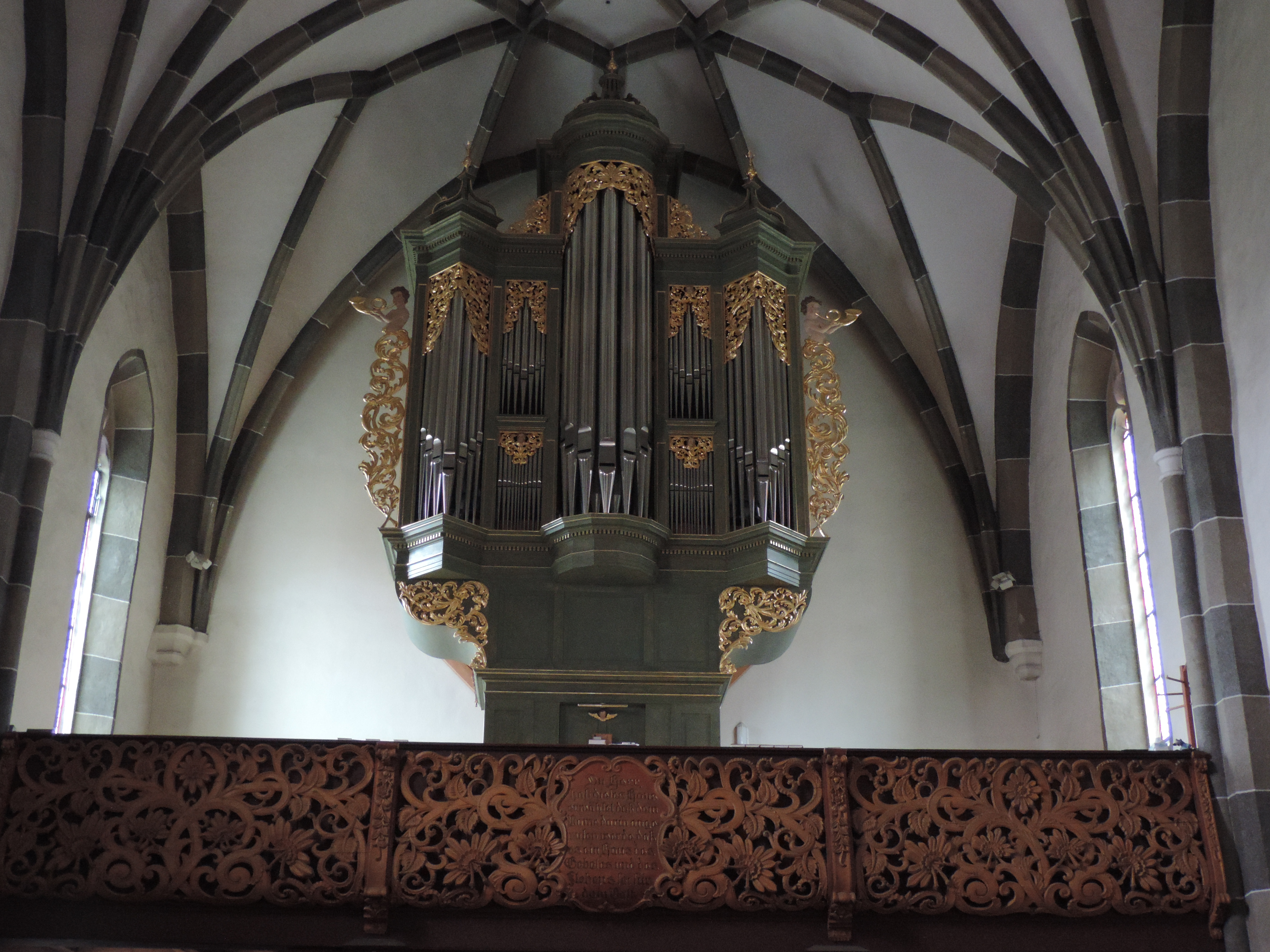 Orgel in Taufkirchen an der Pram, Pfarrkirche, Ober-Österreich